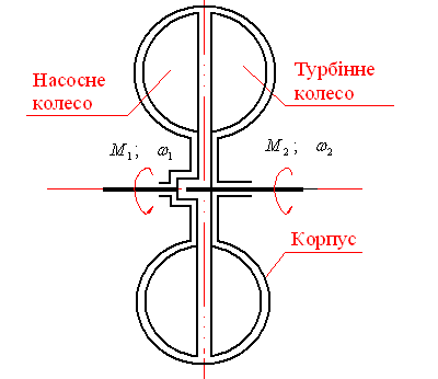 Принципова схема гідромуфти.